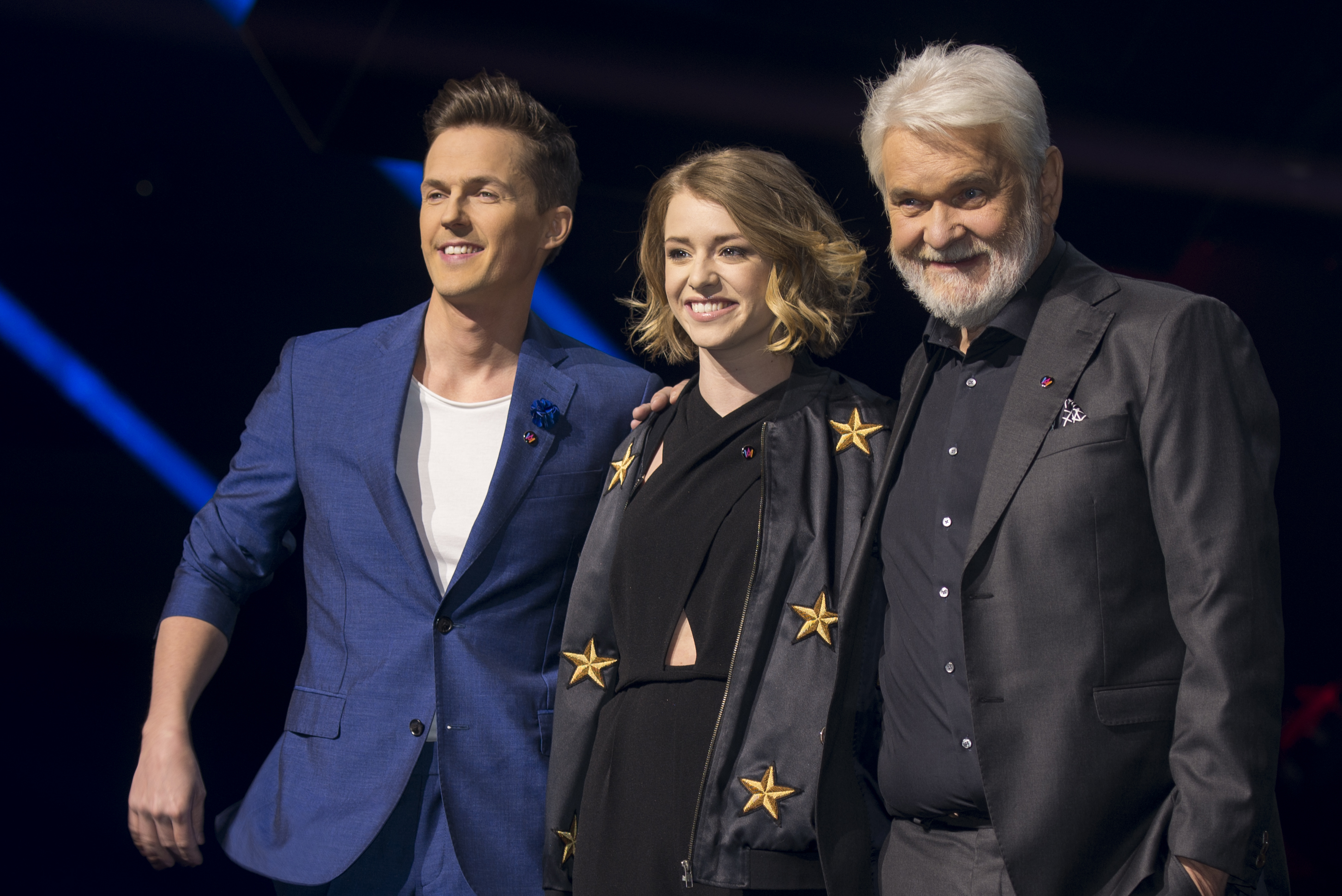 Programledarna för Melodifestivalen 2017. Här på en presskonferens inför första deltävlingen i Göteborg. David Lindgren, Clara Henry, och Hasse Andersson.